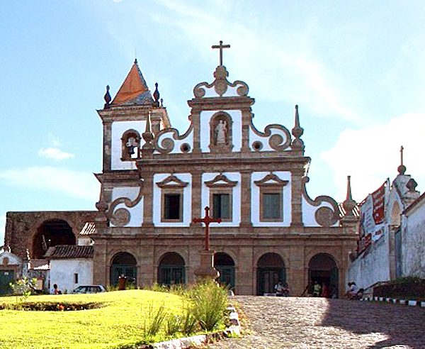 Convento Santo Antônio de Cairu